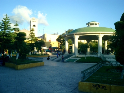 Zòcalo con Convento de San Nicolás Tolentino al fondo, Actopan, Hidalgo